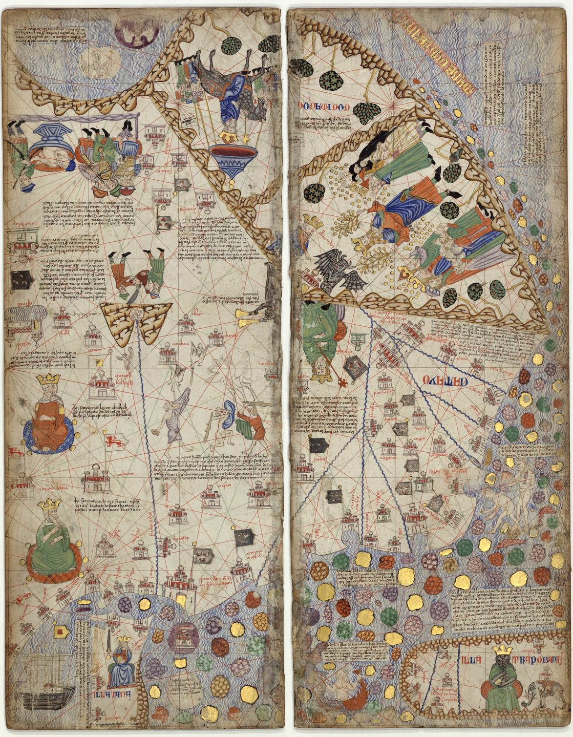 Full 6 de l'Atles Català de Biblioteca Nacional de França